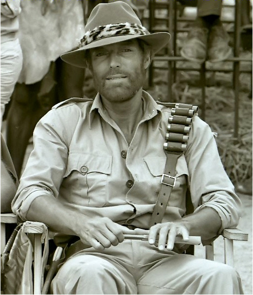 Richard Chamberlain na planie filmu "Kopalnie króla Salomona".